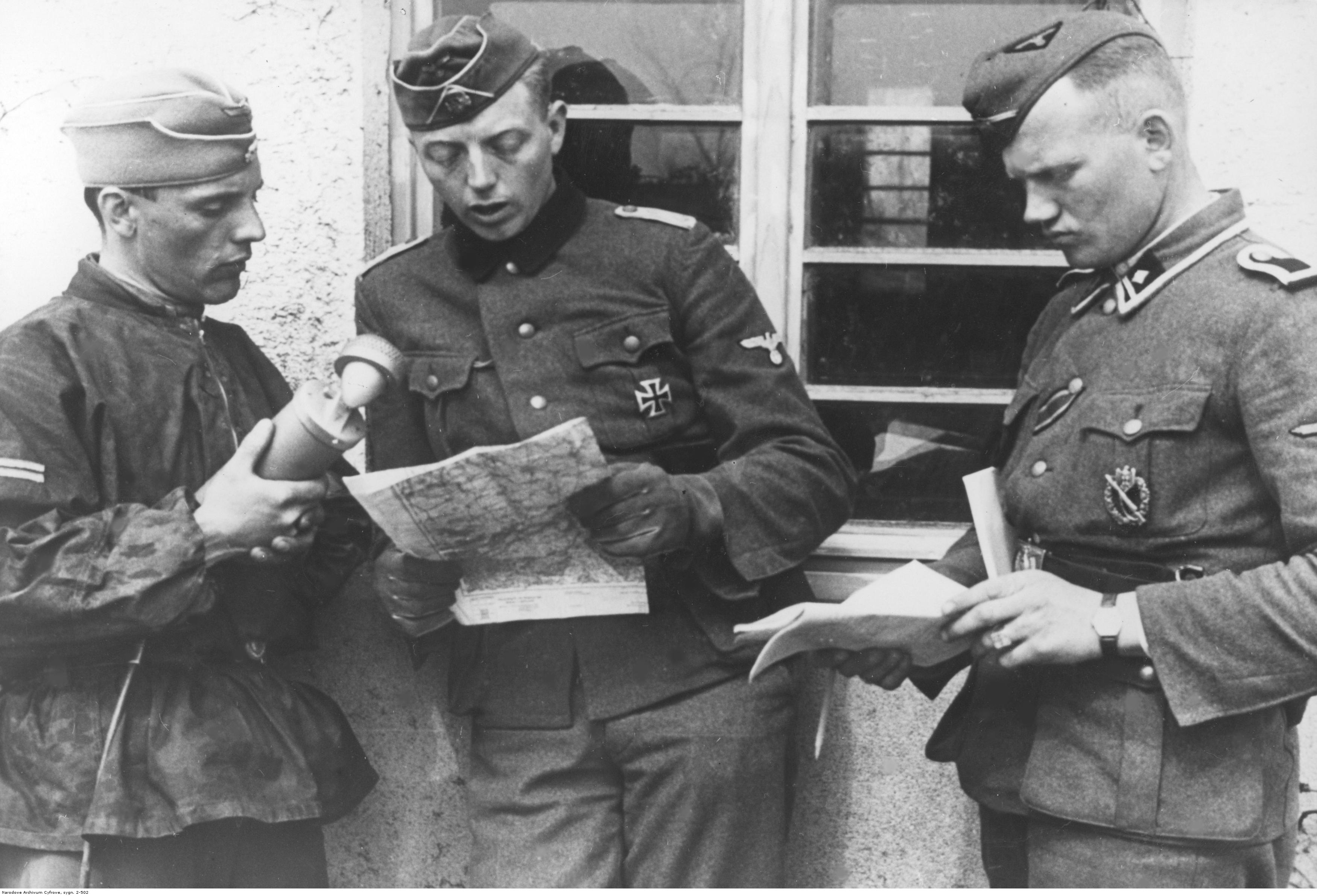 SS-Hauptsturmfuhrer Fritz Klingenberg, oficer 2. Dywizji Pancernej SS "Das Reich" (w środku), który na czele 9-osobowego oddziału jako pierwszy wdarł sie do Belgradu, udziela wywiadu reporterowi radiowemu.